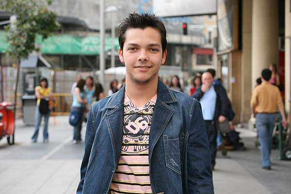 Sergio Rivero